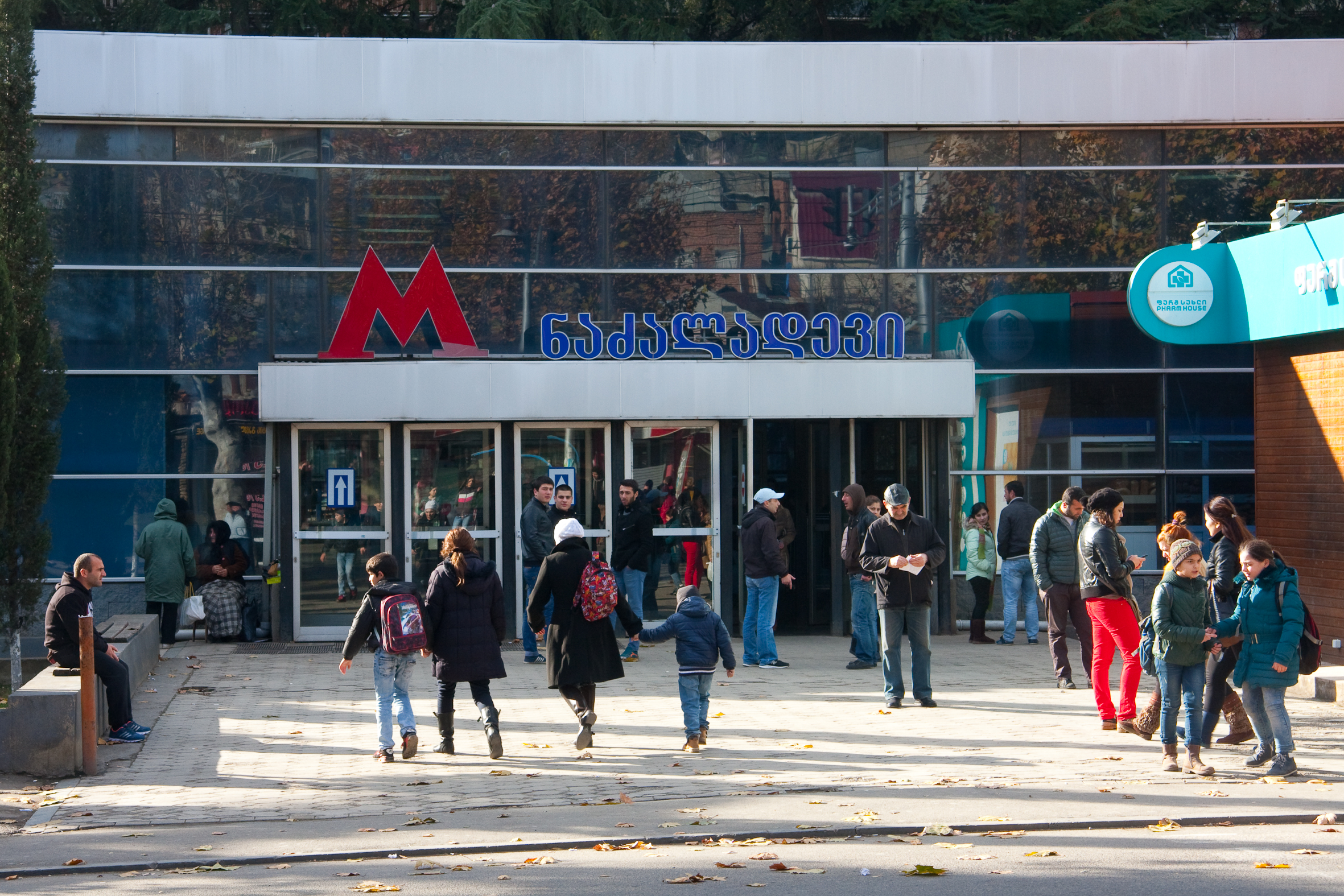 Stacja metra Nadzaladewi w Tbilisi